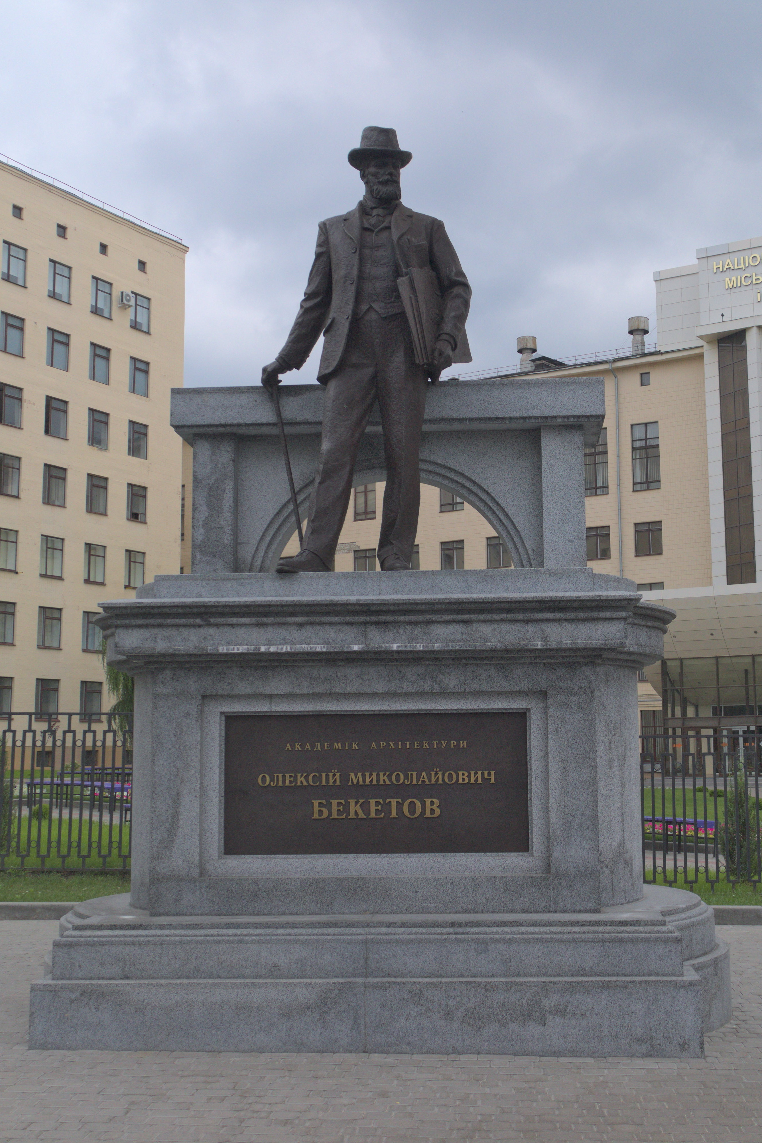 Пам'ятник академіку О.М. Бекетову в Харкові навпроти входу до Харківського національного університету міського господарства імені О. М. Бекетова